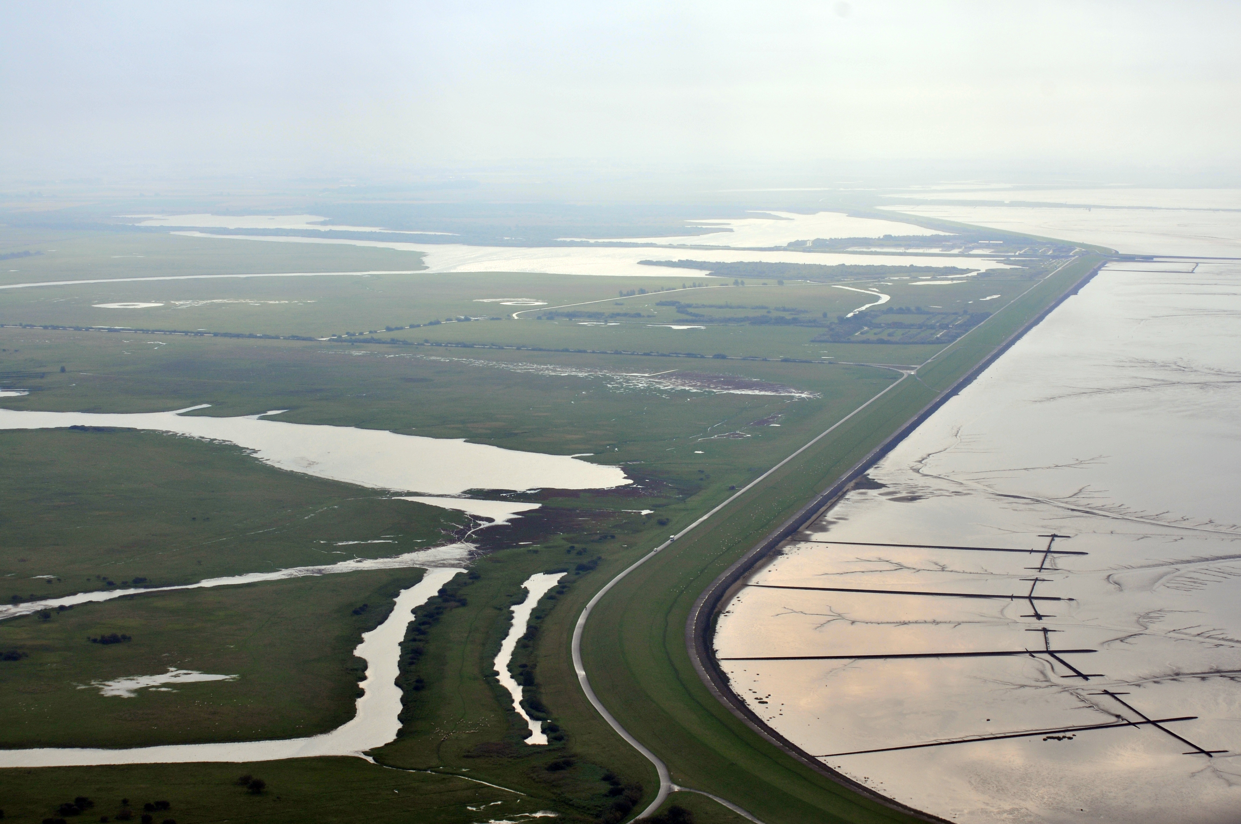 Fotoflug 4. Sept. 2011, Speicherkoog